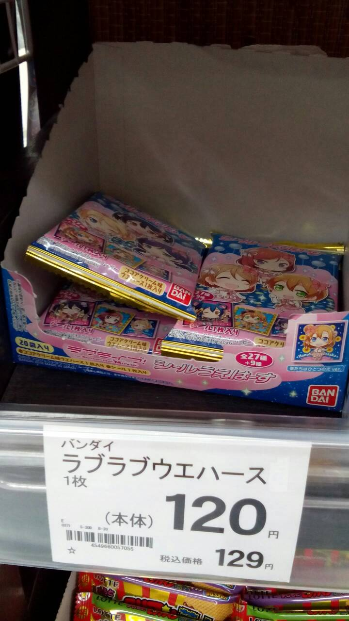 愛媛県内のあるスーパーの値札における誤植。